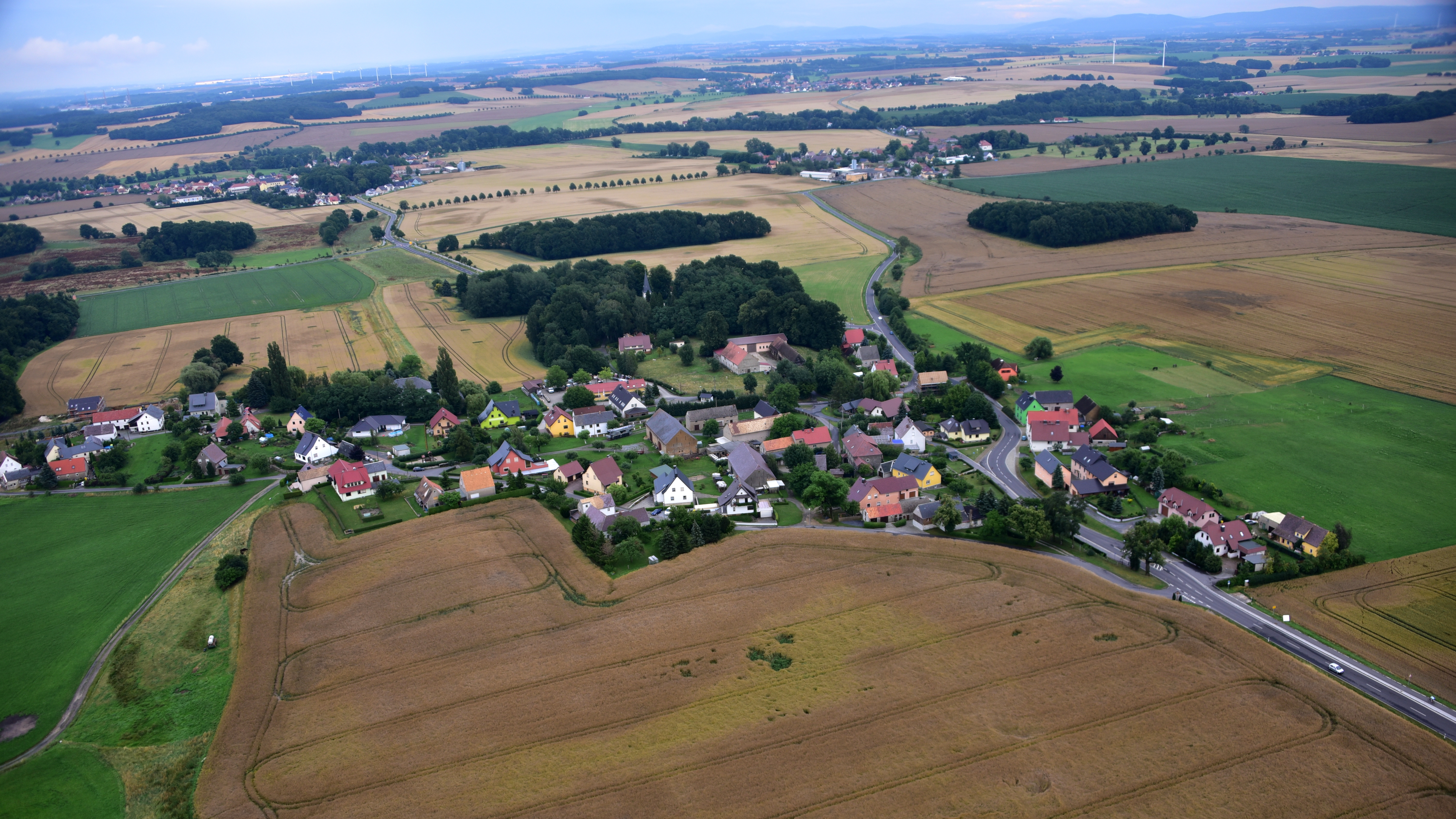 Schmeckwitz, Luftaufnahme (2017) Hornjoserbsce: Powětrowy wobraz Smječkec (2017)